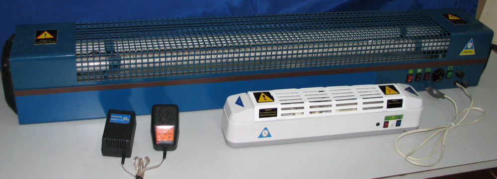 Промышленные озонаторы. В качестве одного из электродов используется тлеющий газовый разряд.